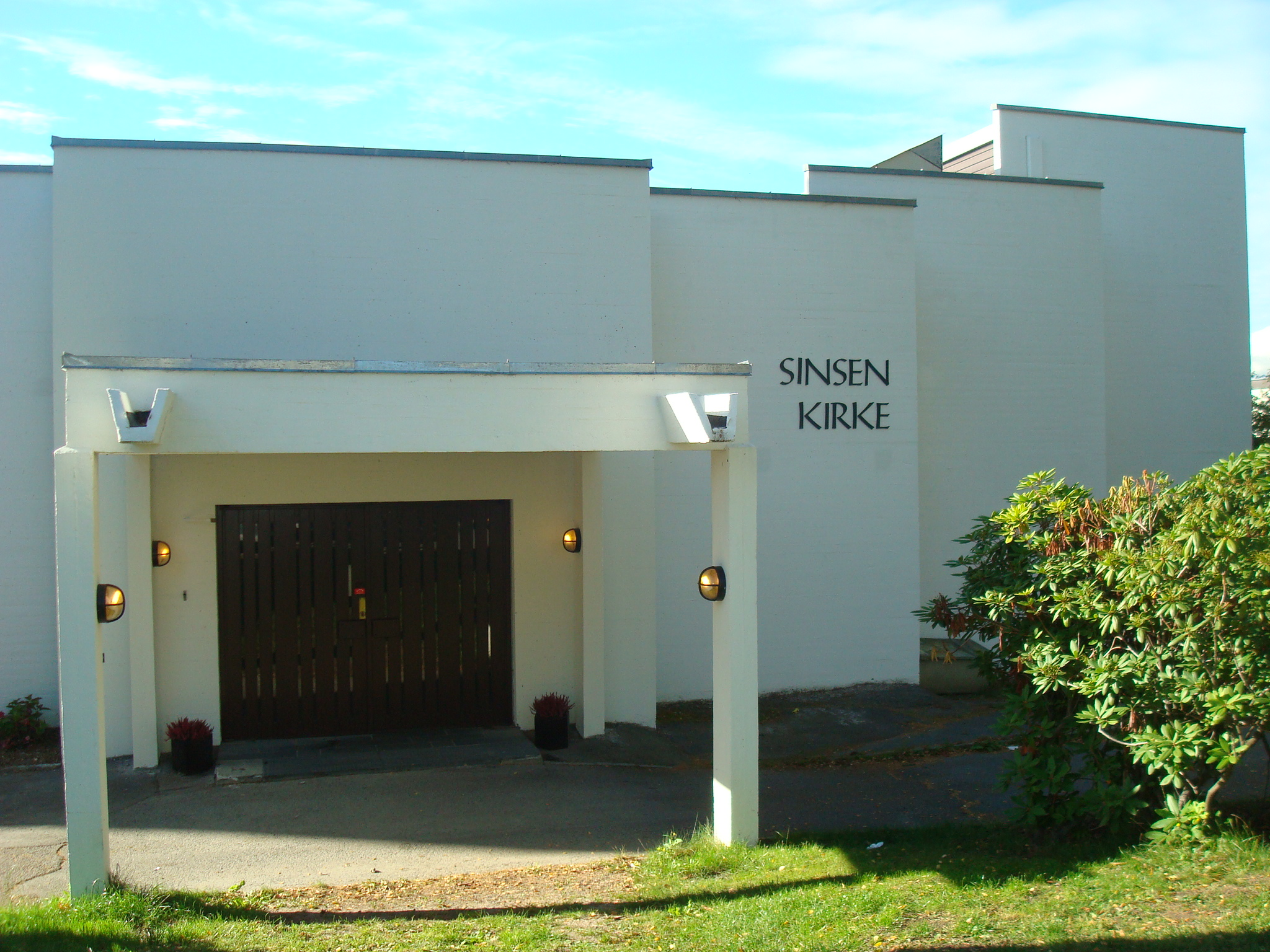 Sinsen kirke